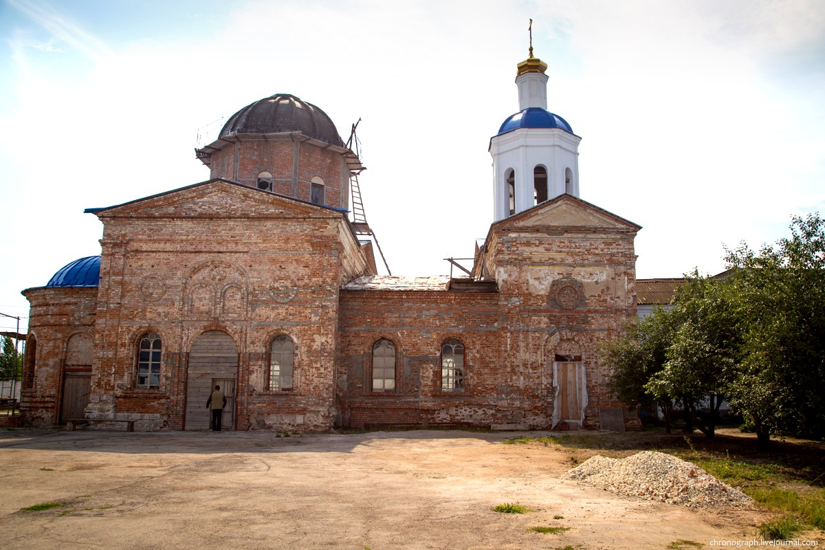 Церковь Фёдоровской Божьей Матери. Вознесенский Сызранский мужской монастырь